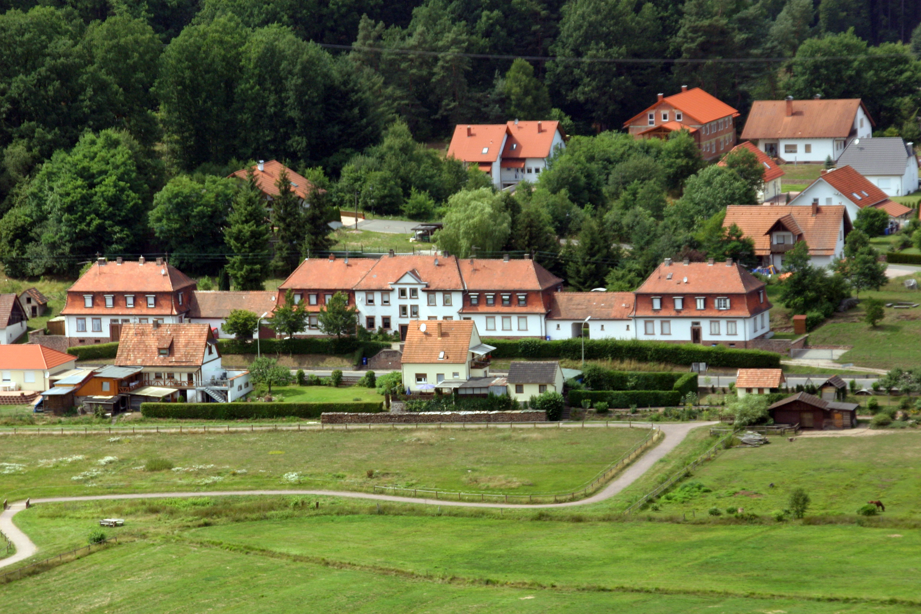 Ludwigswinkel